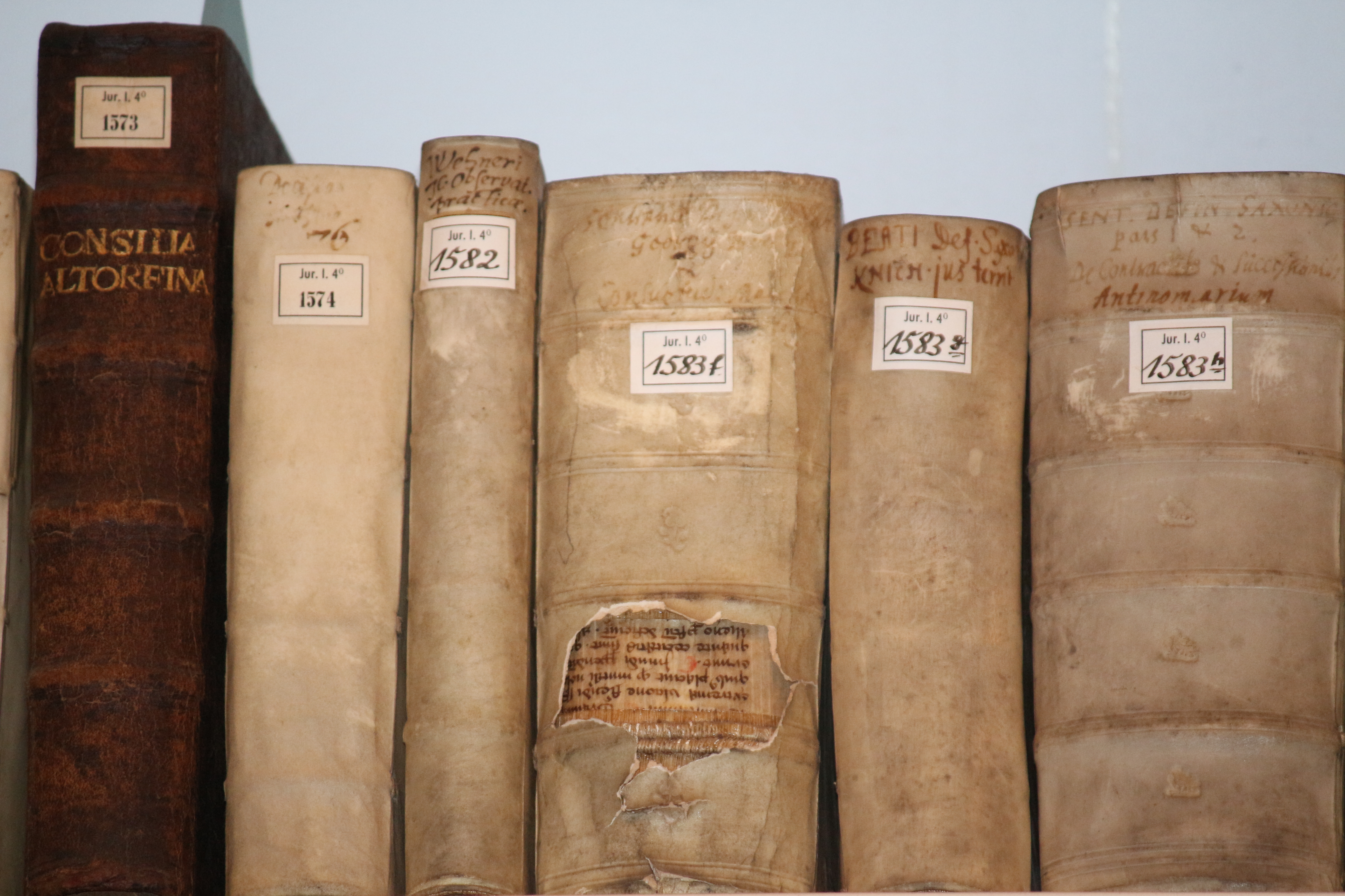 Buchrücken in Mantelssaal der Stadtbibliothek Lübeck